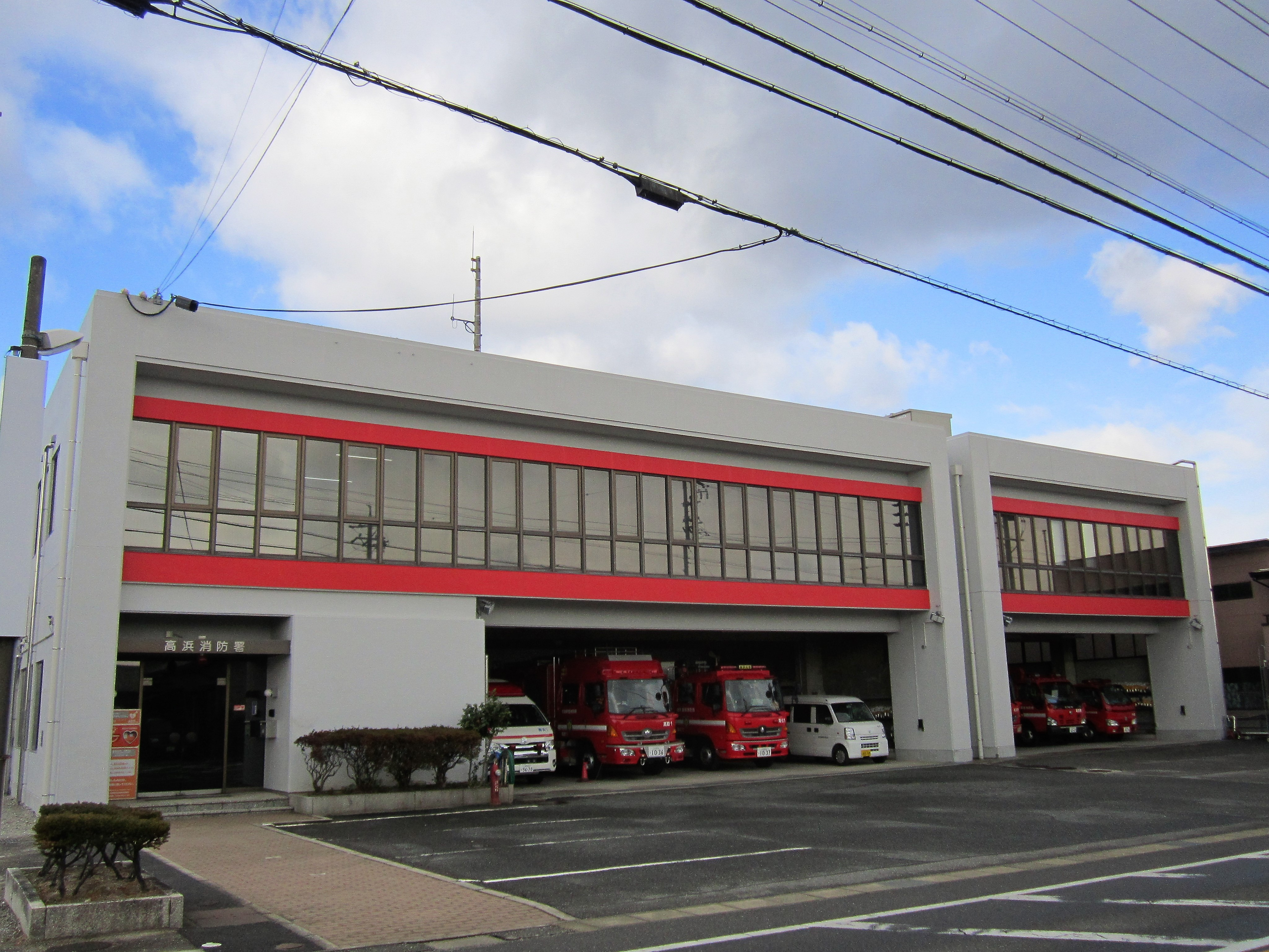 衣浦東部広域連合 高浜消防署（高浜市稗田町） Canon PowerShot A2200